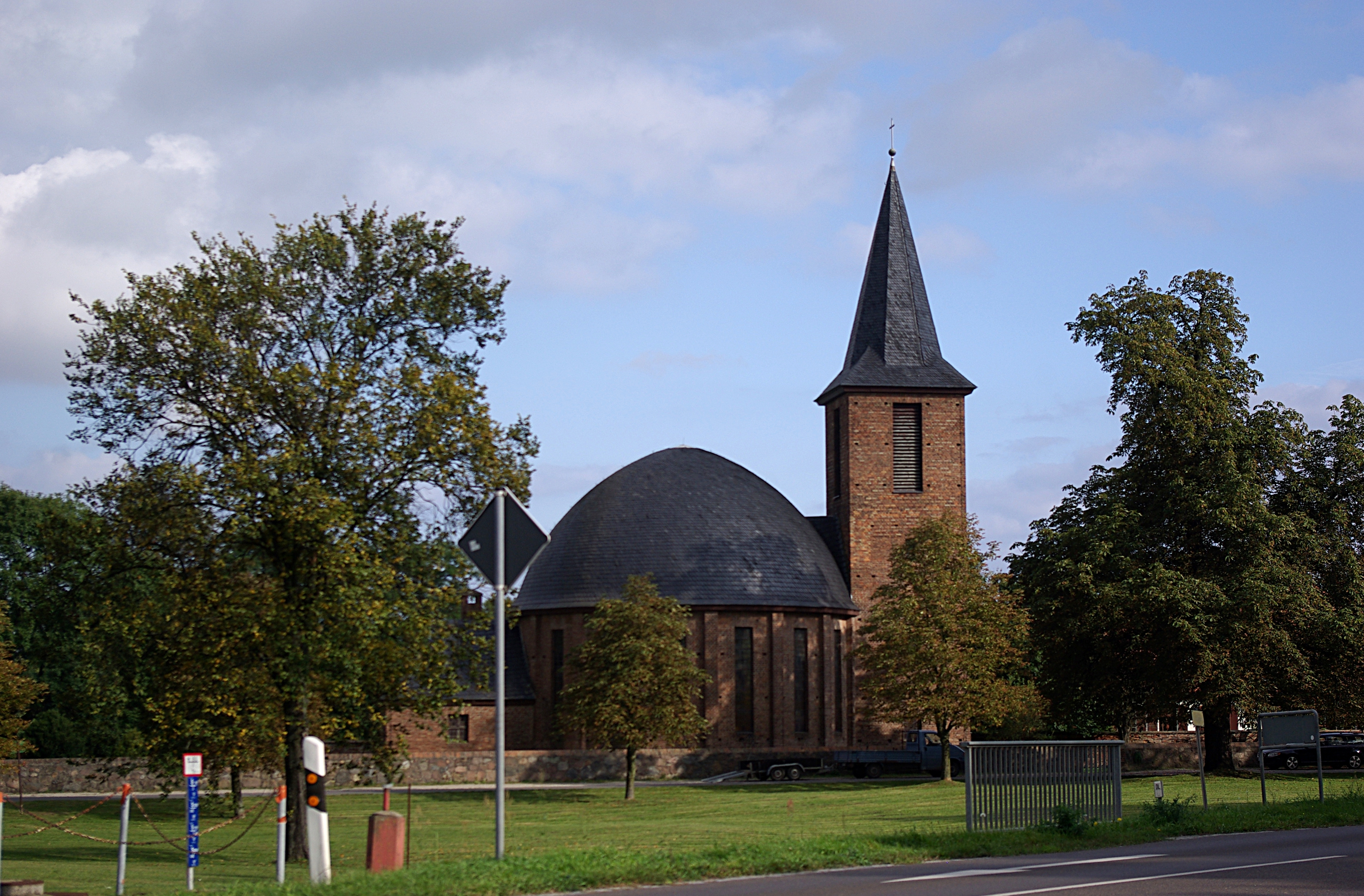 Bliesdorf, Ortsteil Kunersdorf. Die Kirche wurde 1955 erbaut und steht unter Denkmalschutz. Der Vorgängerbau wurde im Zweiten Weltkrieg zerstört.